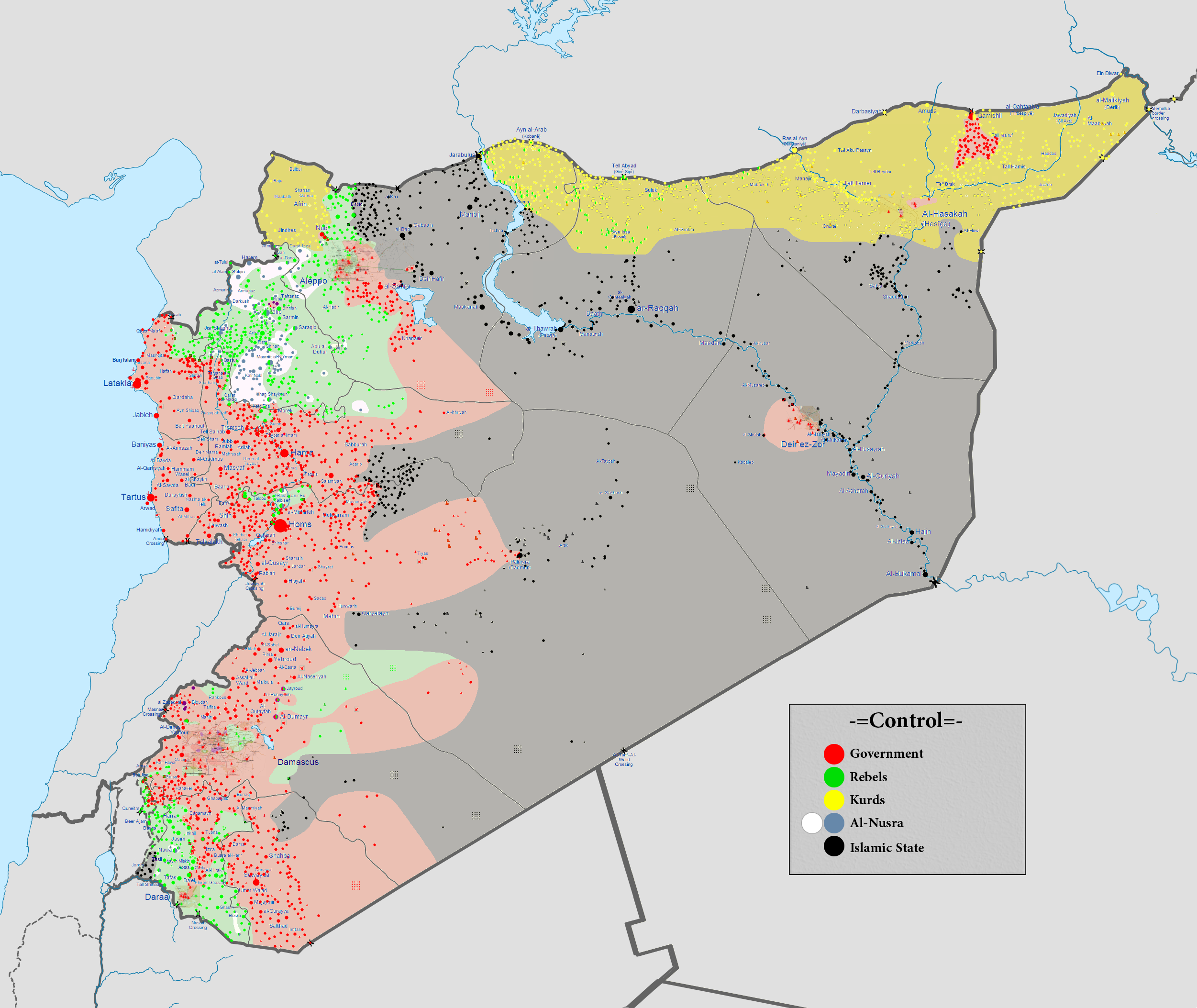 Guerre civile syrienne, au 1er ocobre 2015.